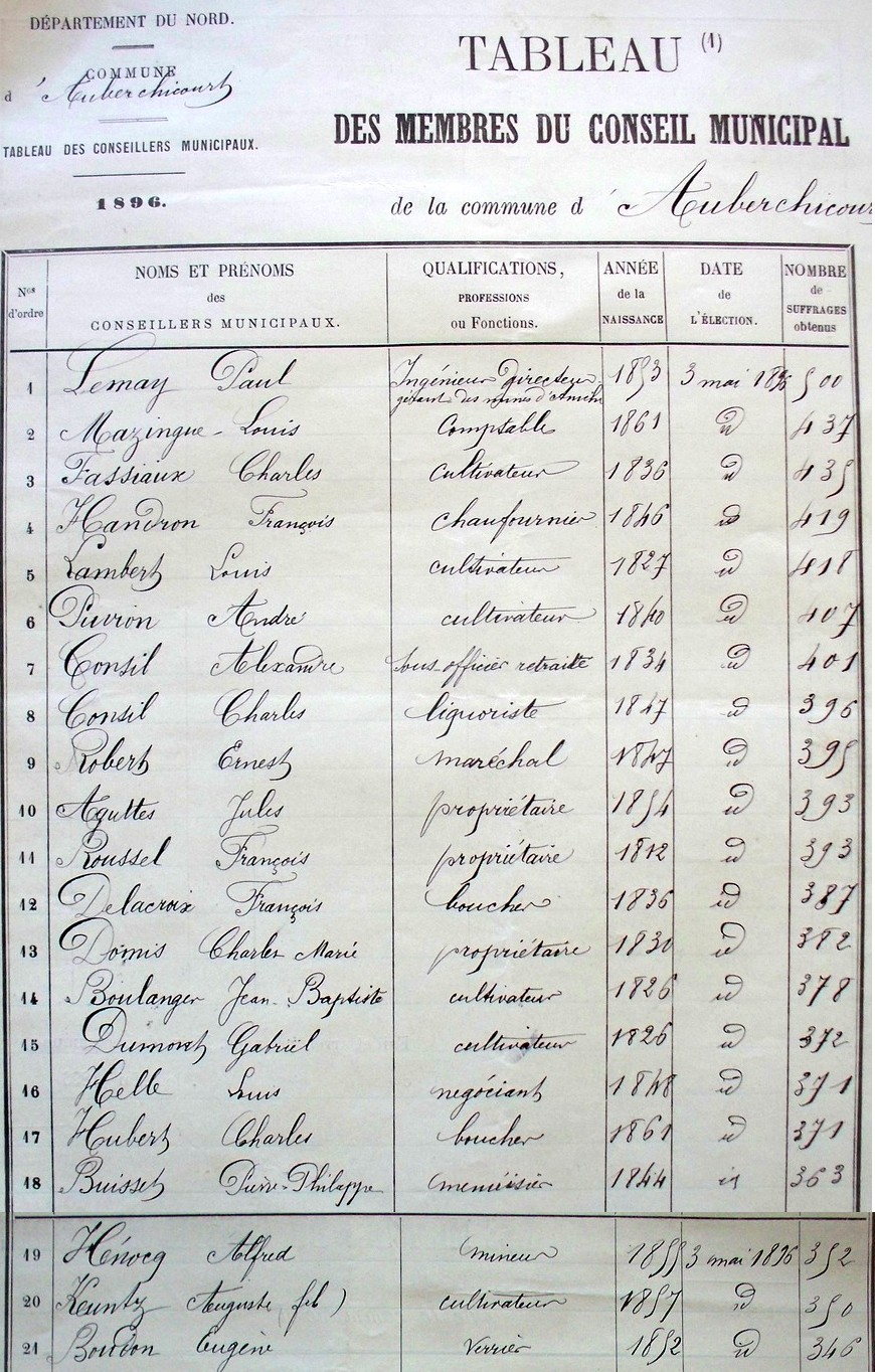 Liste du Conseil Municipal d'Auberchicourt le 3 mai 1896, en 7éme position: CONSIL Alexandre, Sous-Officier retraité.